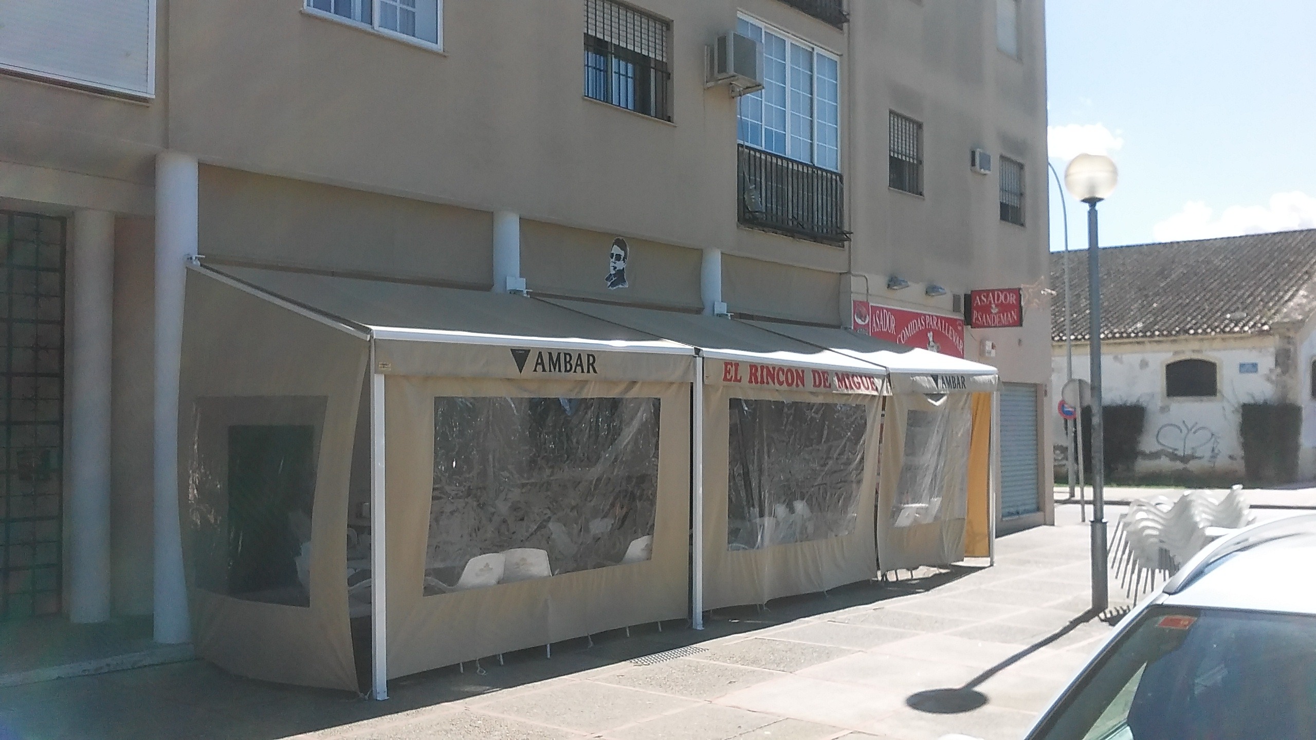 bar dedica a Migue deLos Delincuentes